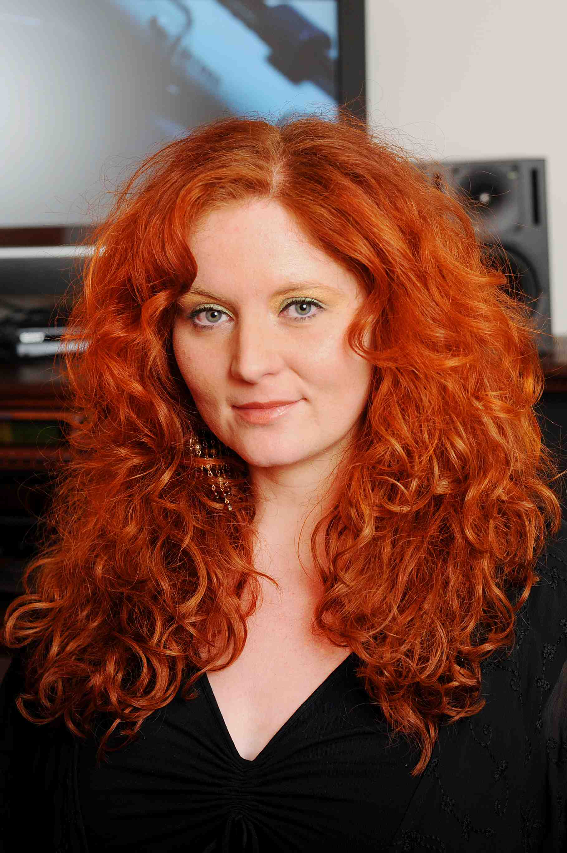 Martina Eisenreich im Studio (2012)